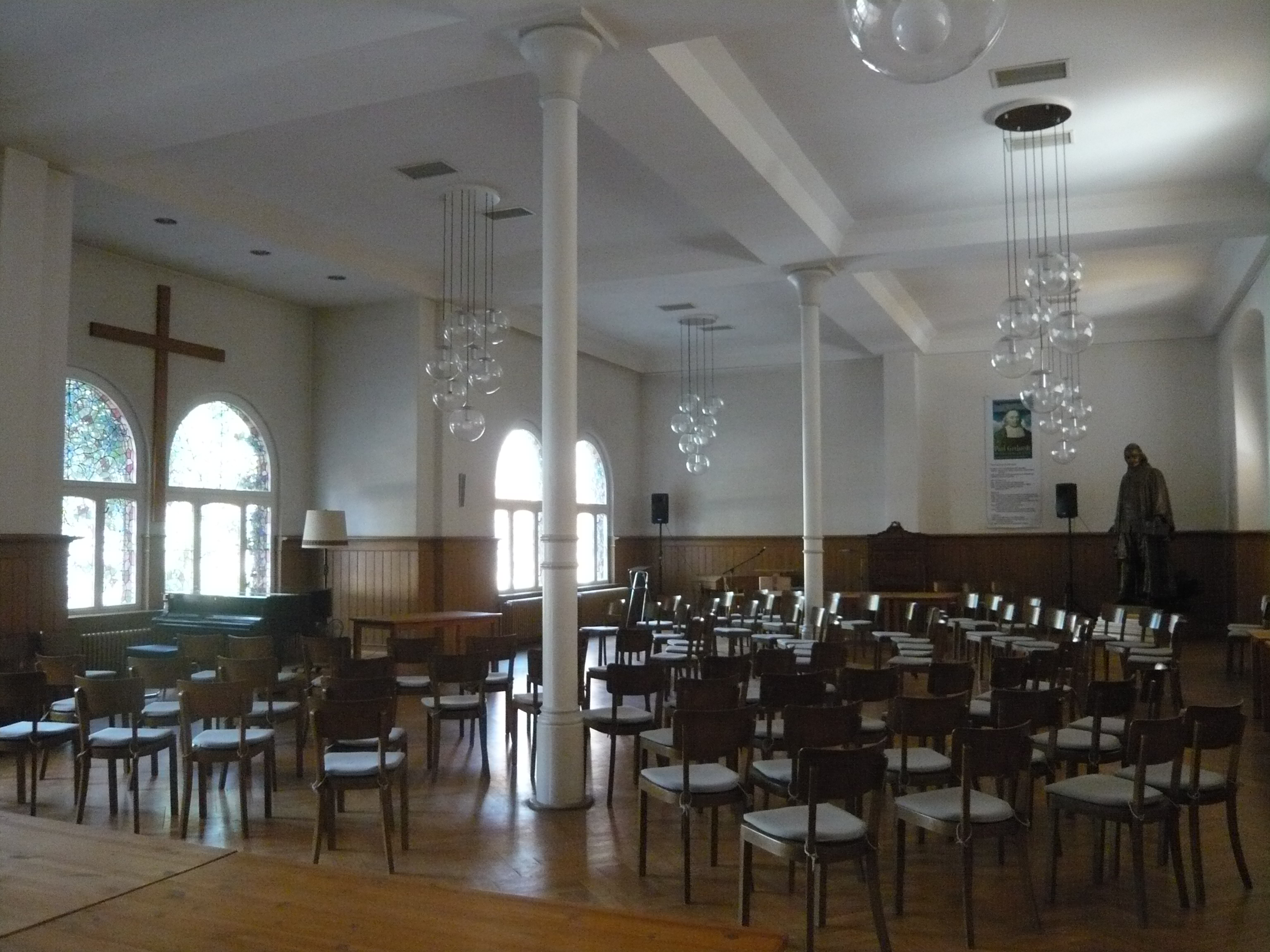 Paul-Gerhardt-Stift Berlin